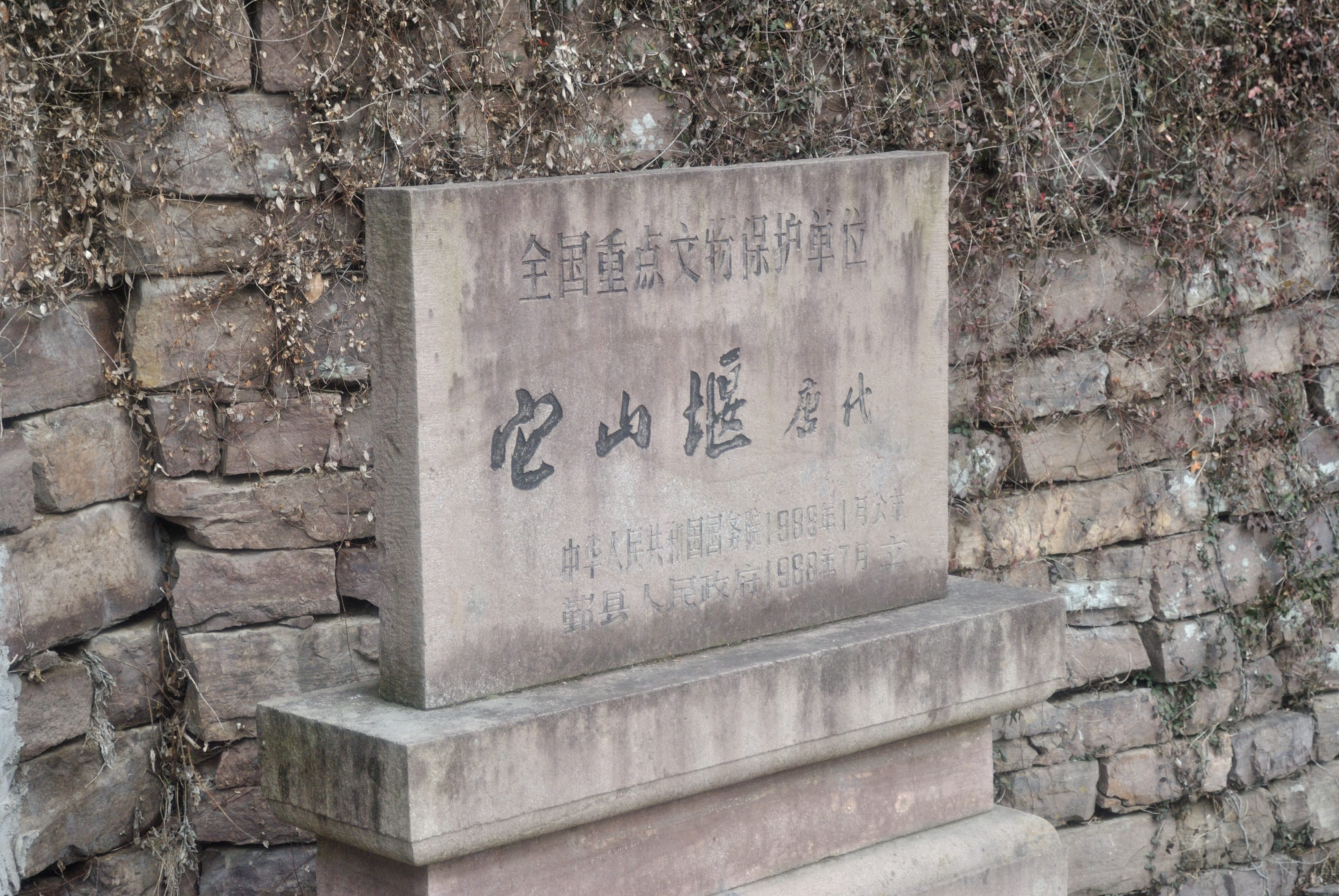 它山堰保护碑